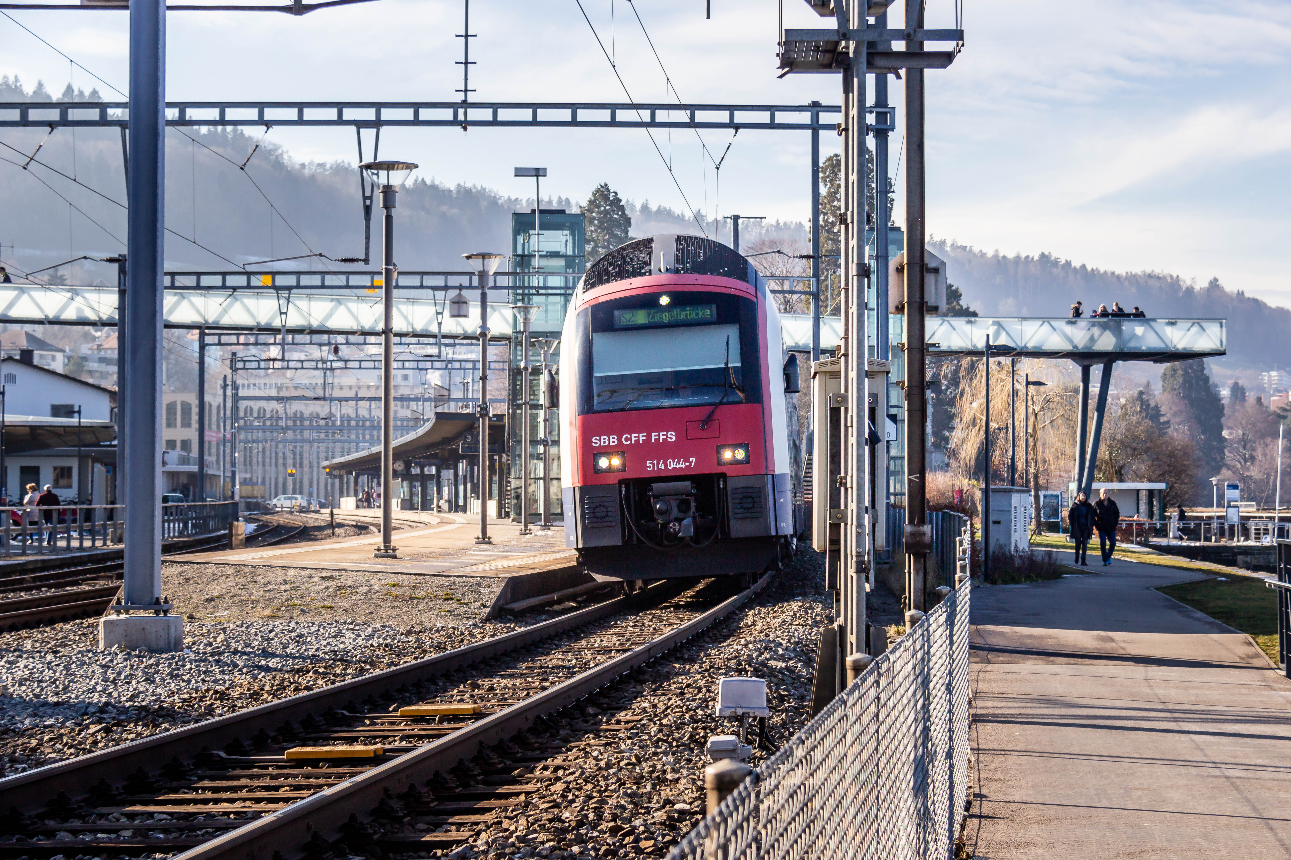 S2 der S-Bahn Zürich kurz vor der Abfahrt am Bahnhof Horgen